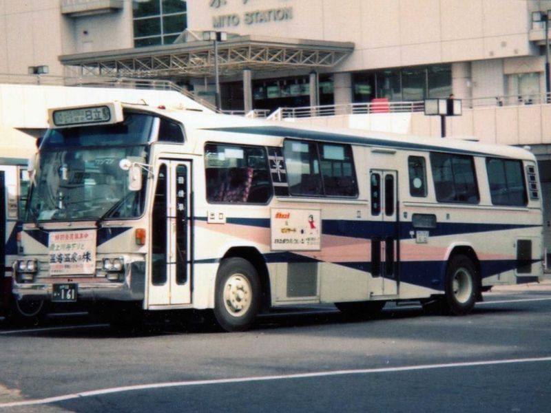 Hitachi Dentetsu Isuzu CRA650 at Mito Sta.